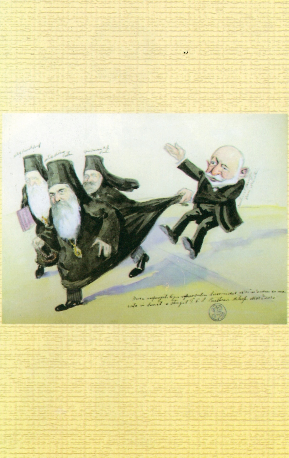 Dacă refuzați legea repausului duminical... (Din mapa-album inedit: Caricaturi, Repausul duminical la Senat, martie 1908